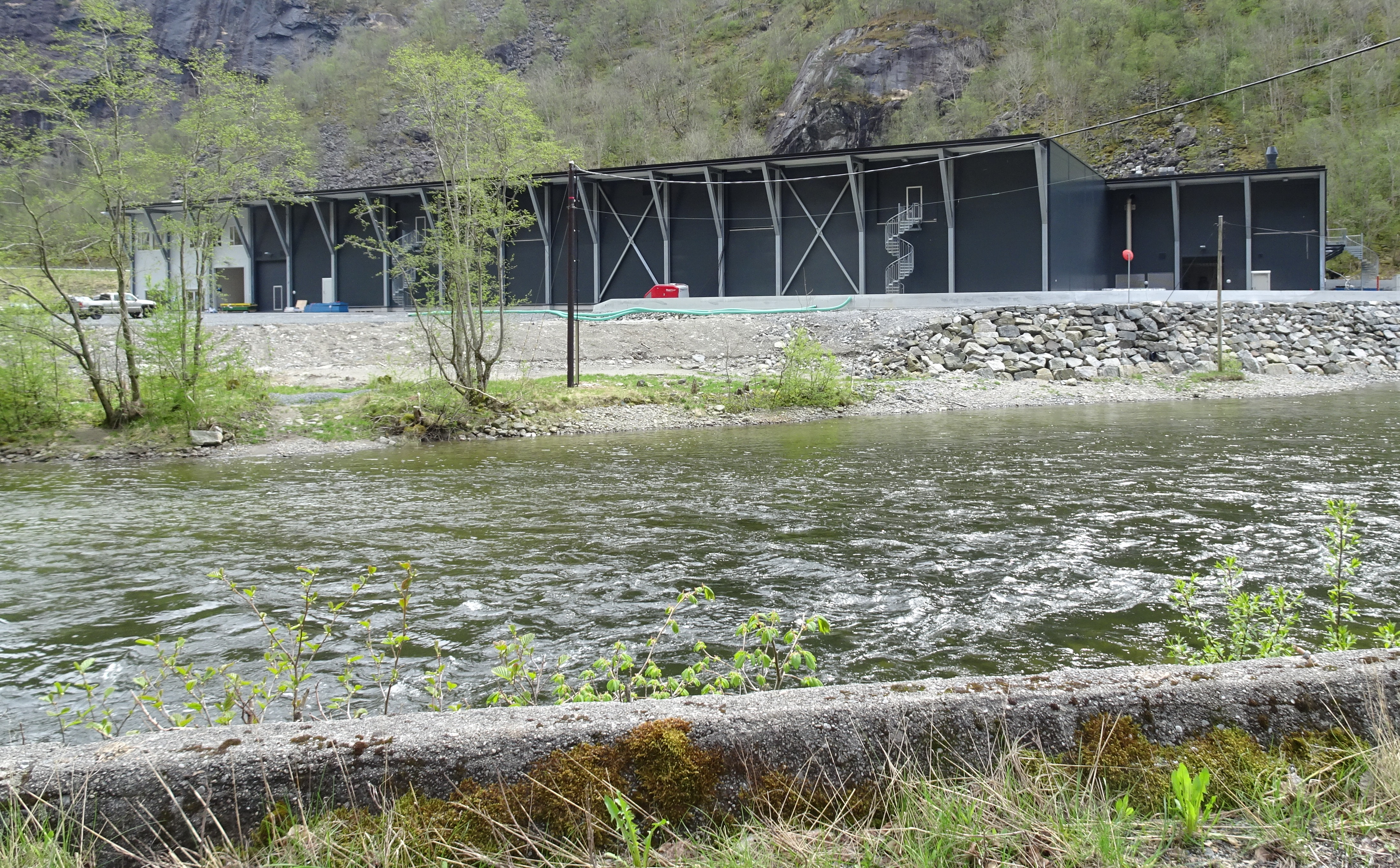 Marine Harvests anlegg i Fjæra i Etne kommune